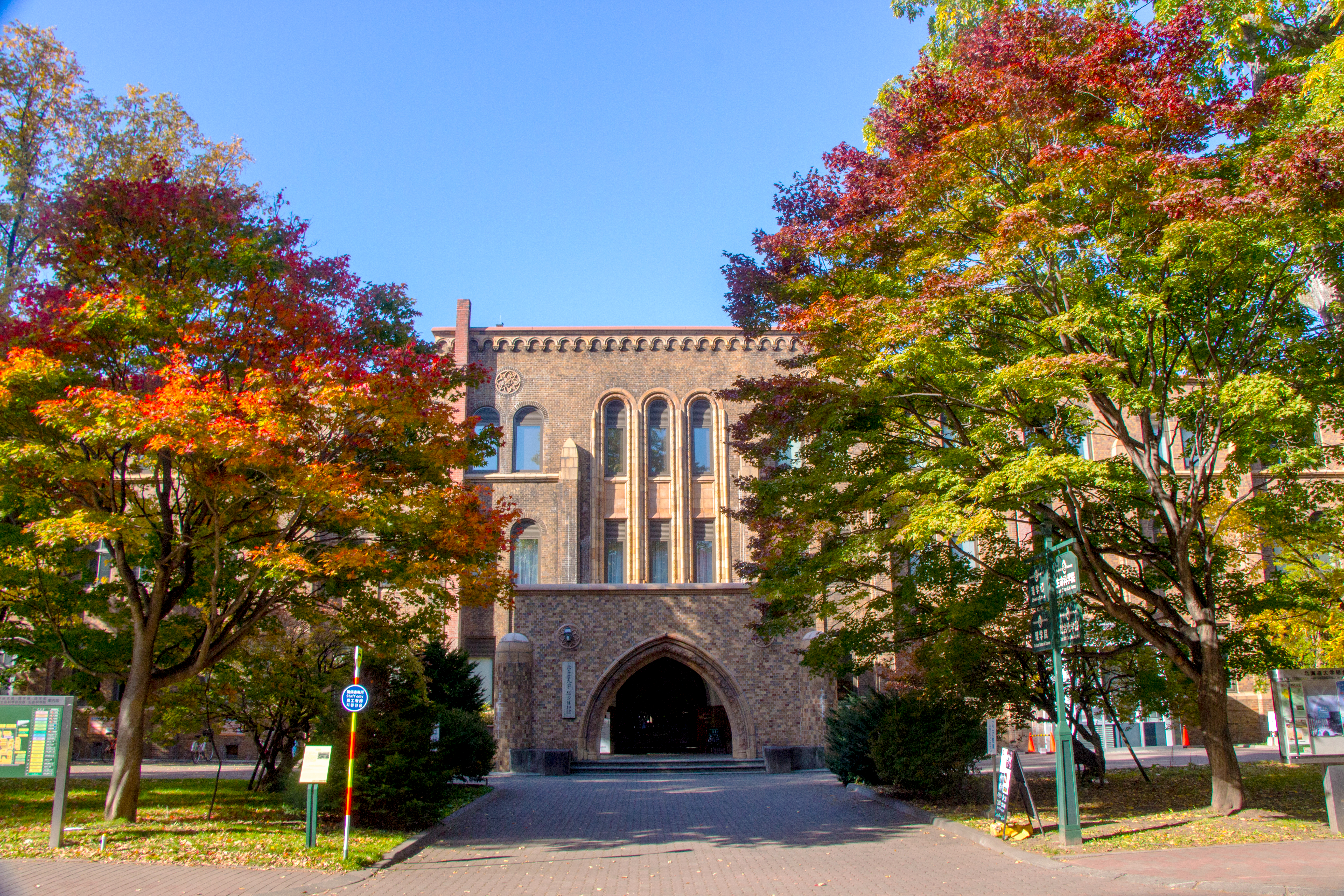 北海道大学総合博物館玄関 2016-10-19撮影